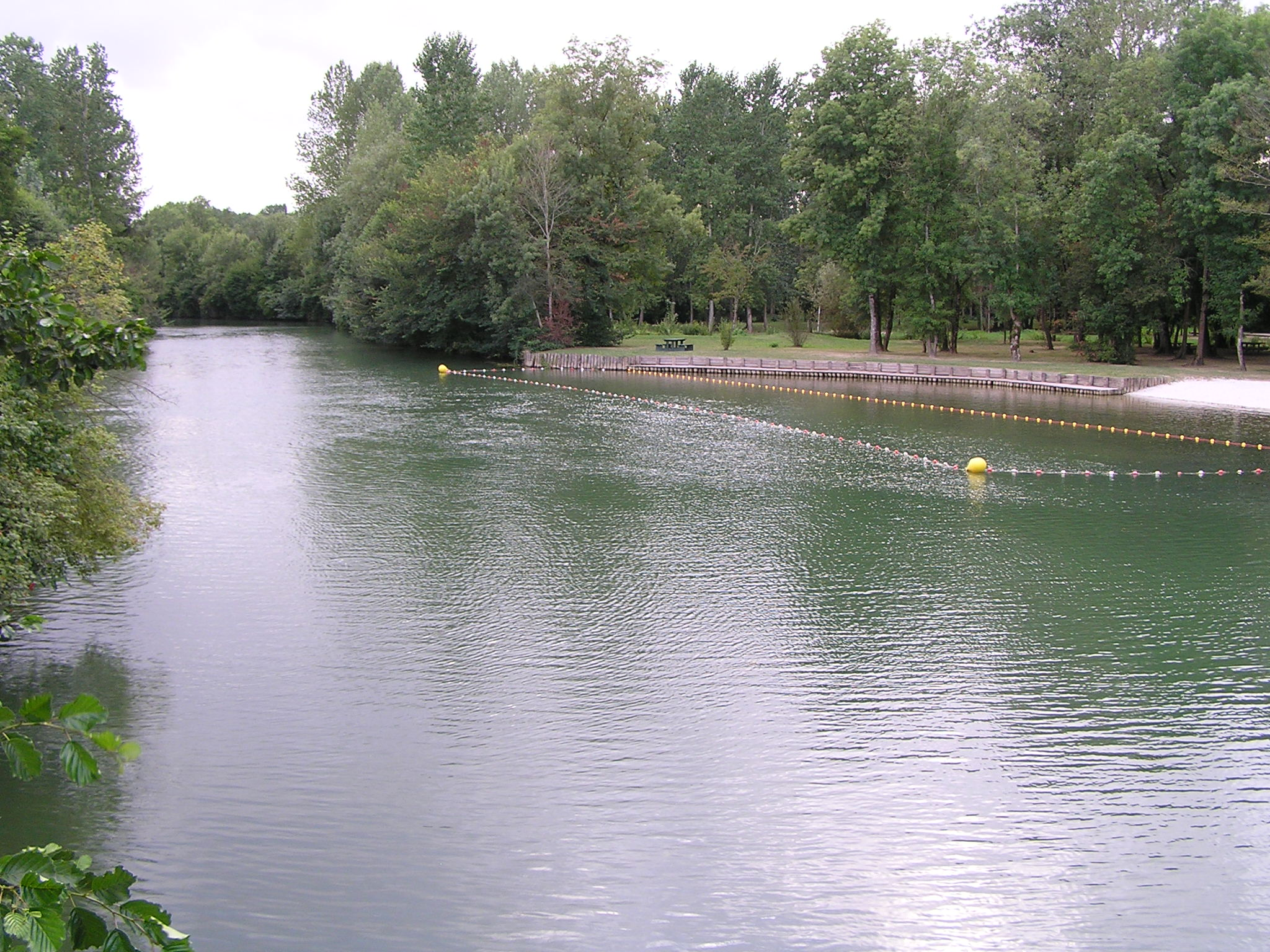 la Charente à Vindelle, Charente, France